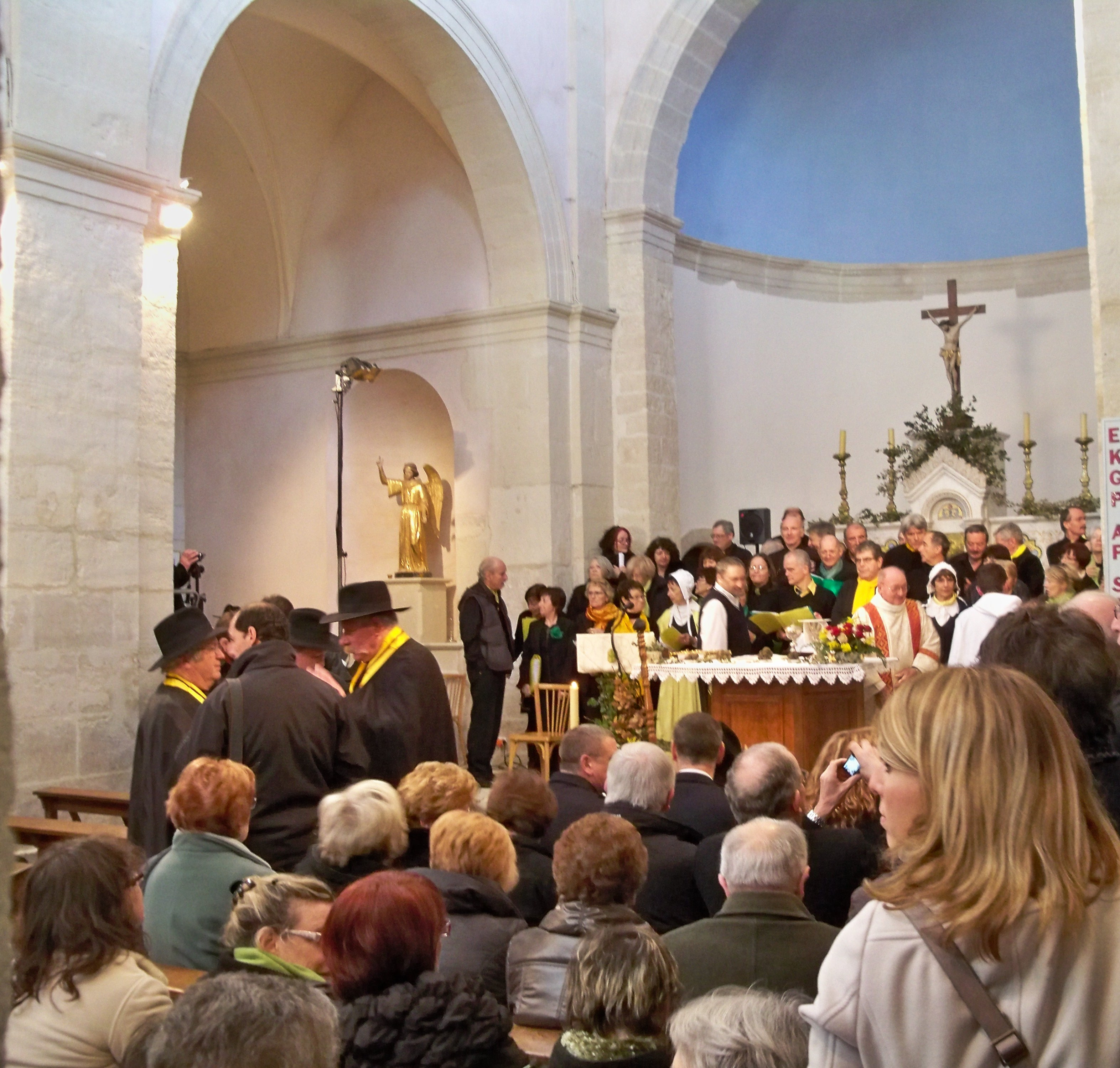 messe aux truffes de Richerenches, Vaucluse, France